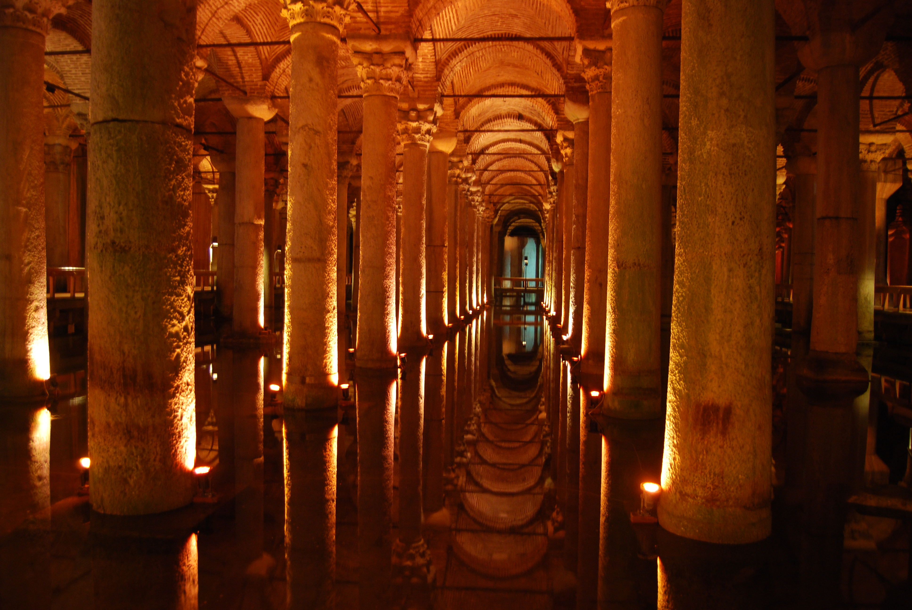 Cisterna Basilica, Junto a Santa Sofia en Estambul Turquia, tambien llamada Cisterna de Yerebatan